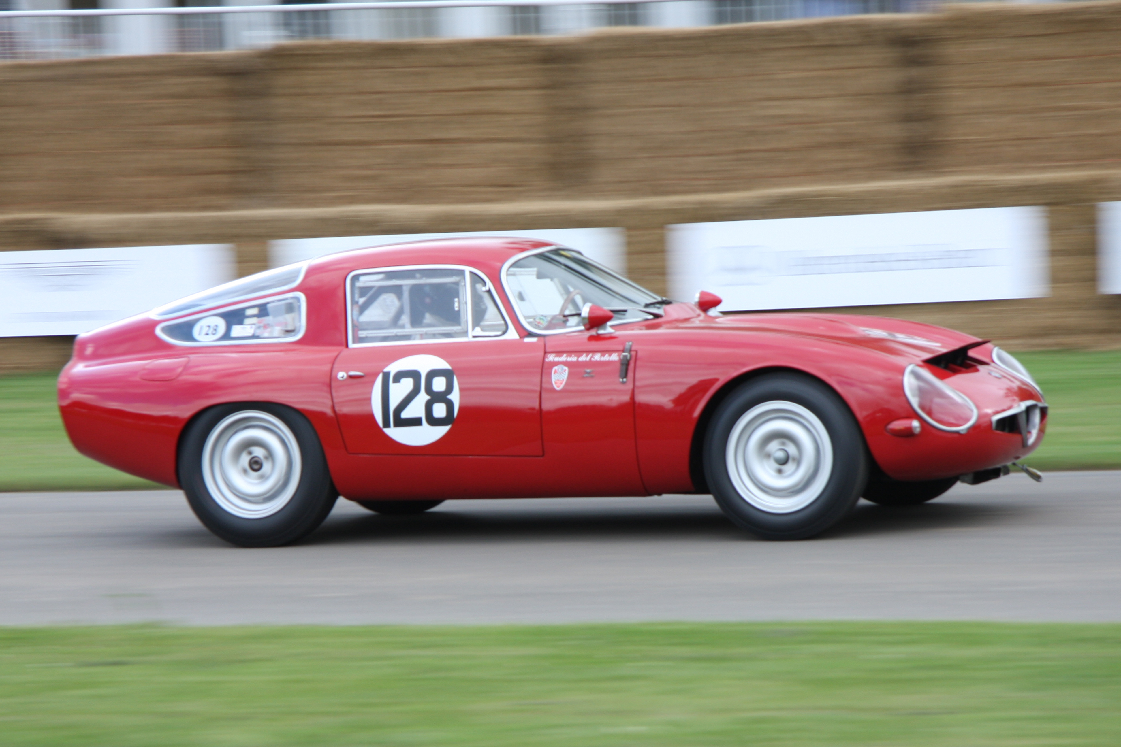 Built 1965. 1.6 litre 4 cylinder